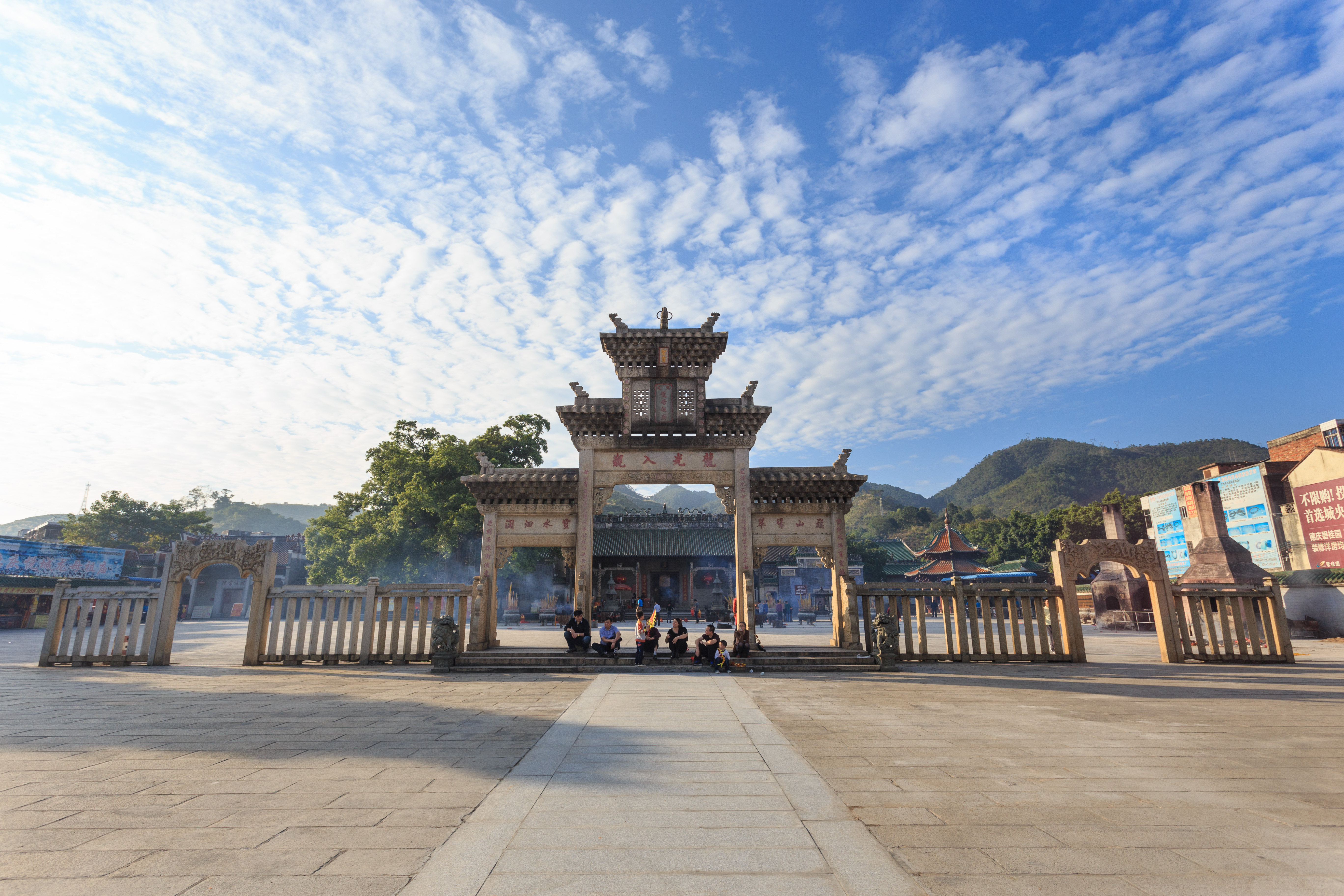 悦城龙母祖庙